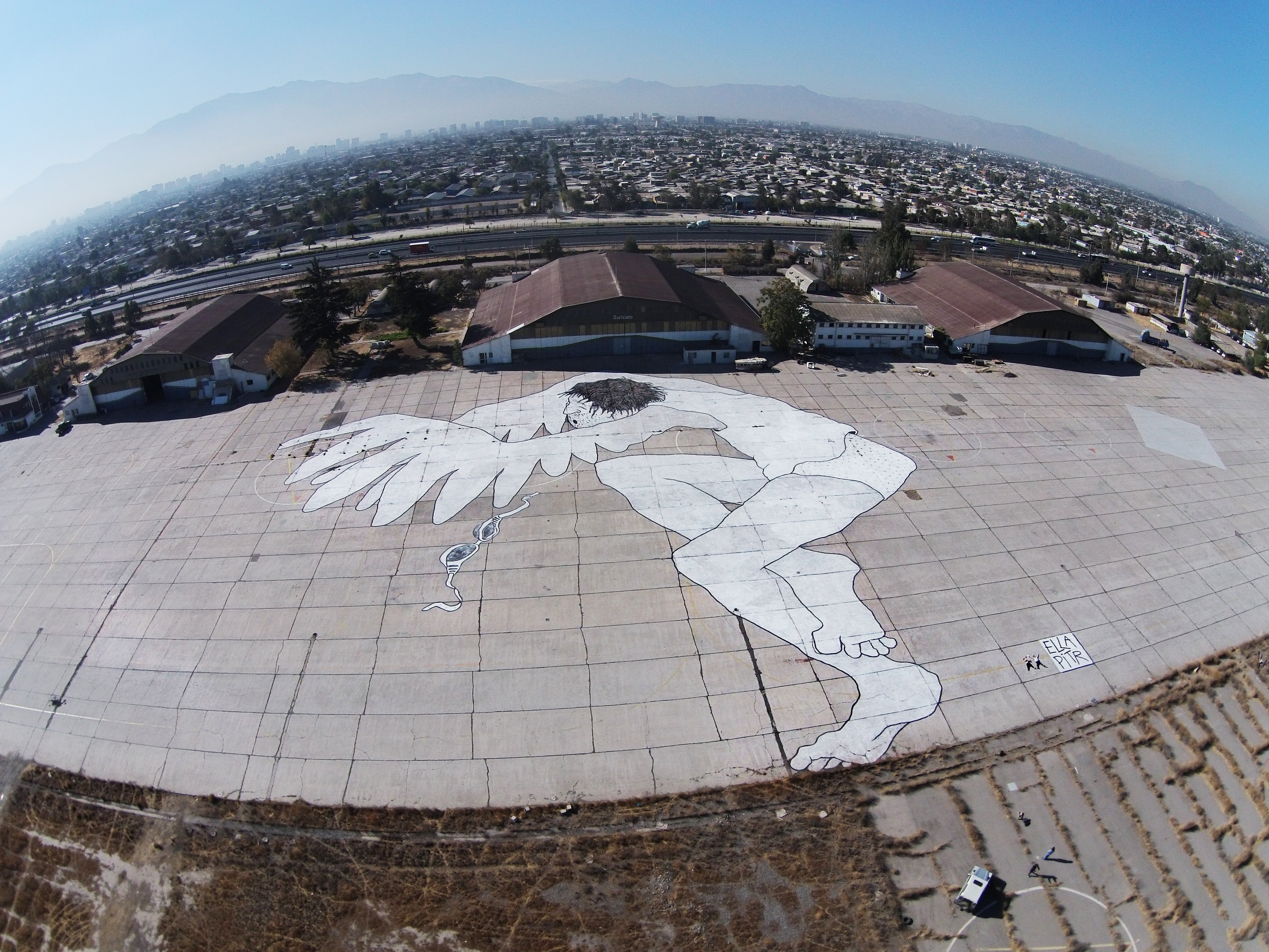 dessin au sol d'Ella & Pitr. Santiago du Chili. 2014